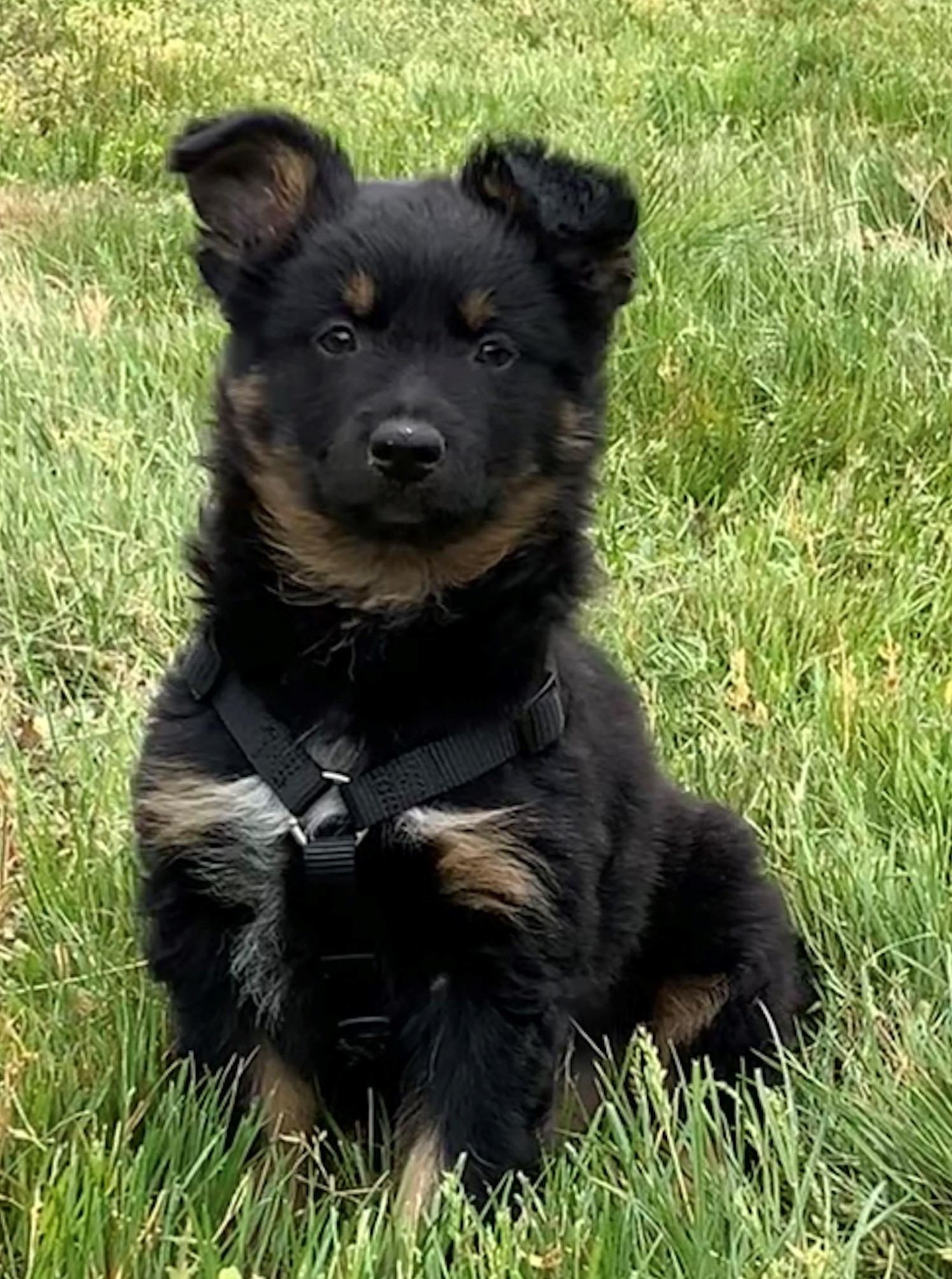 Gelbbacke (altdeutscher Hütehund) Welpe im Alter von ca 9 Wochen